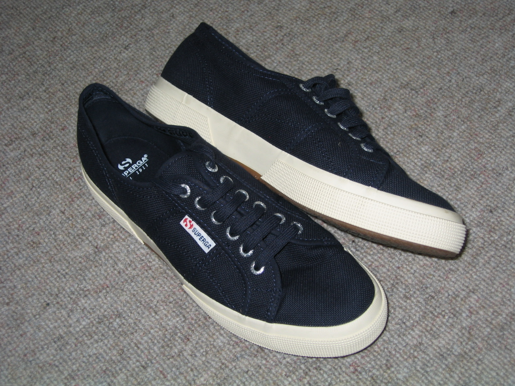 Blue Superga shoes